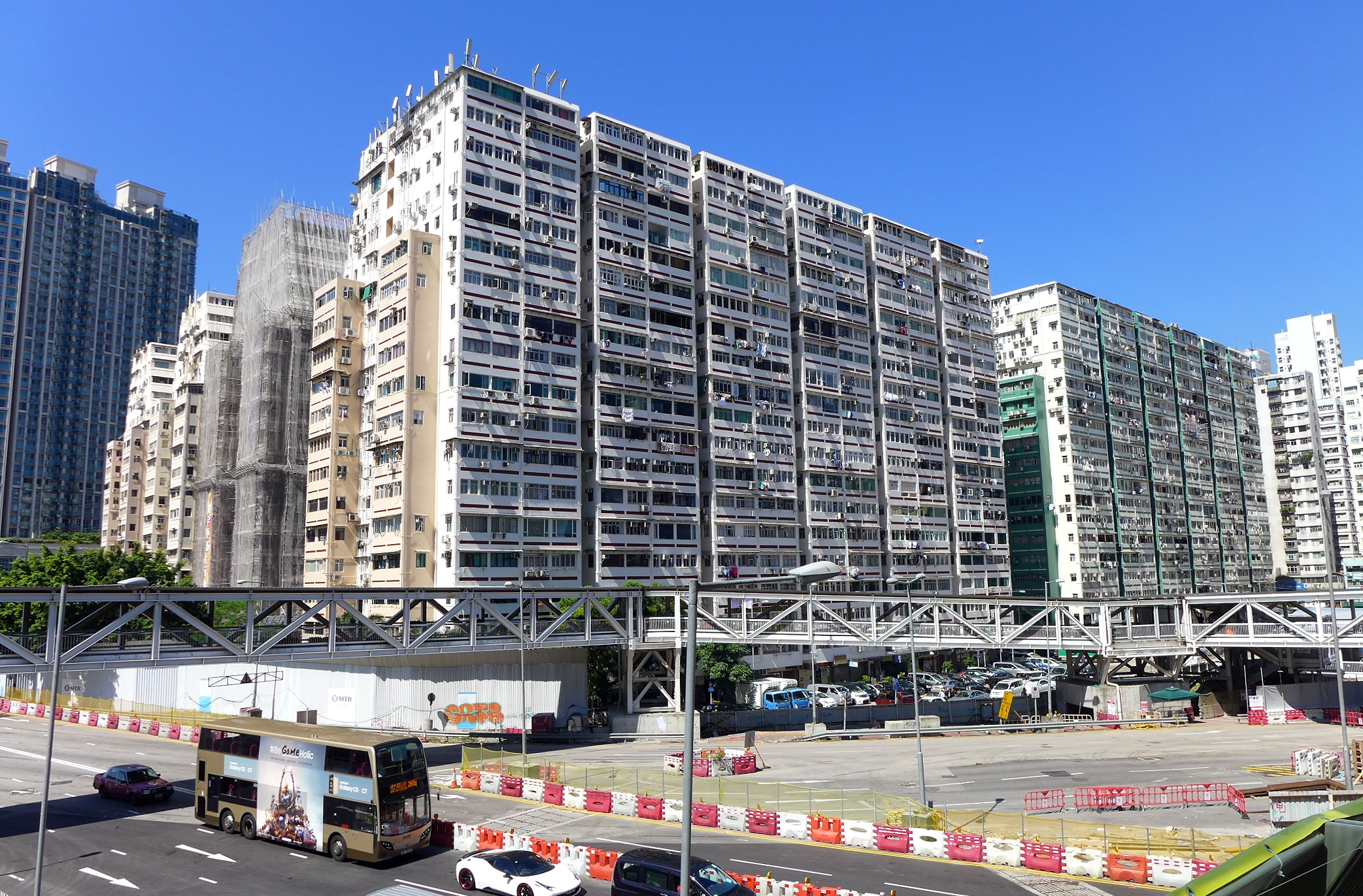 Man Wah Sun Chuen